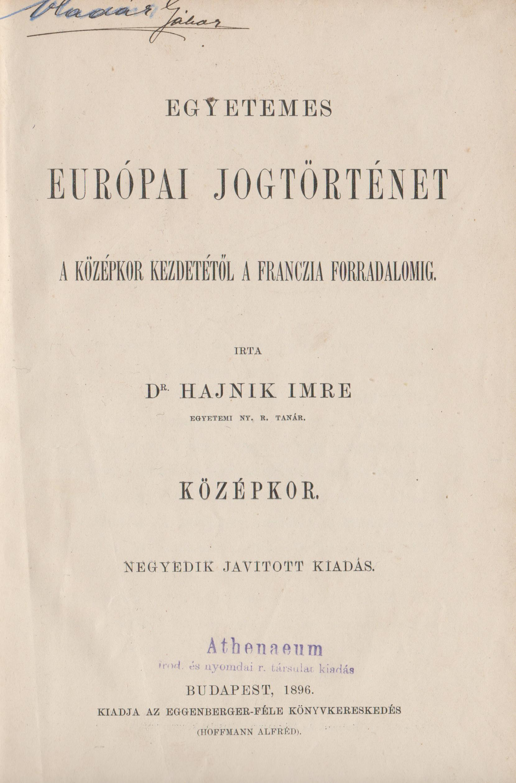 Az adott mű címlapja.